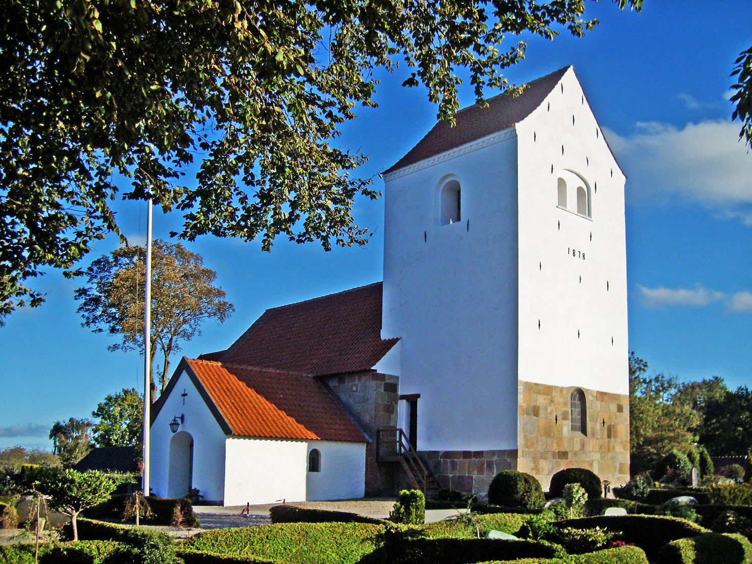 fra nordvest